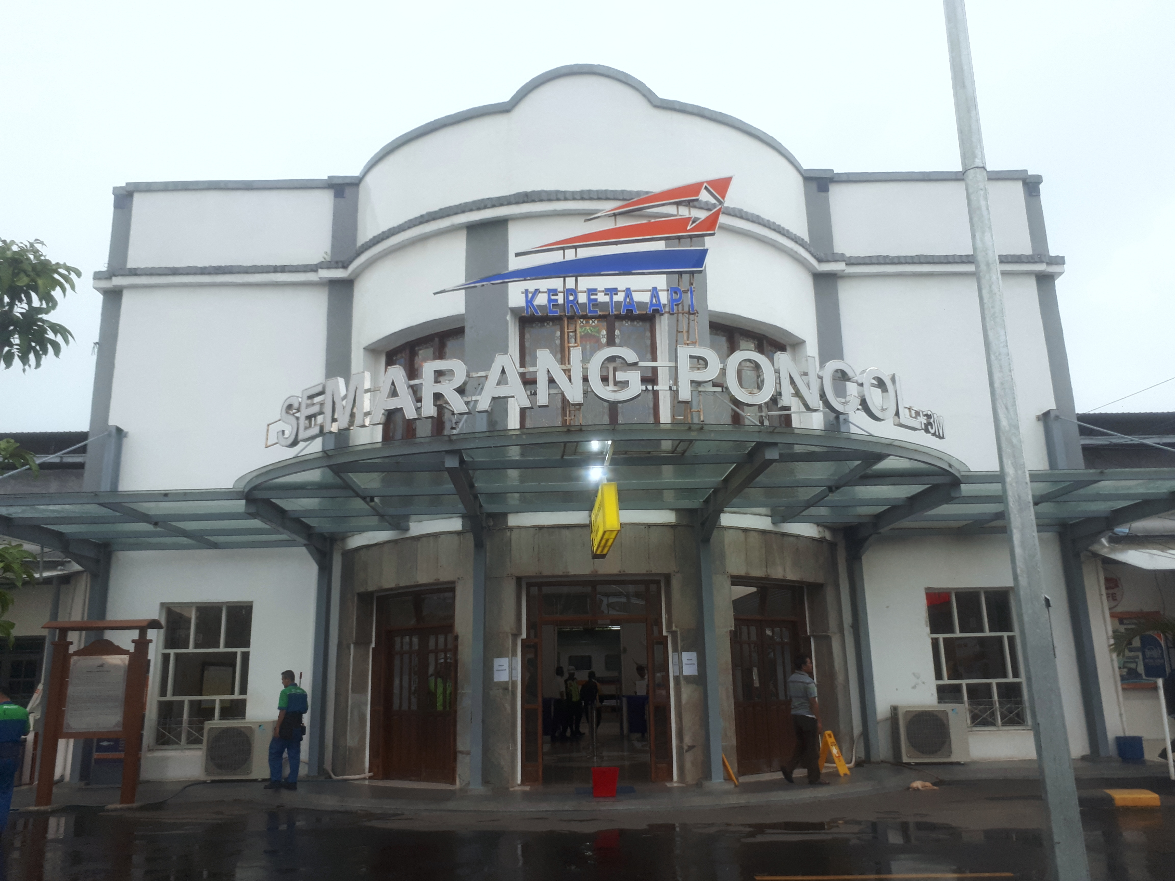 Tampak depan Stasiun Semarang Poncol tahun 2020